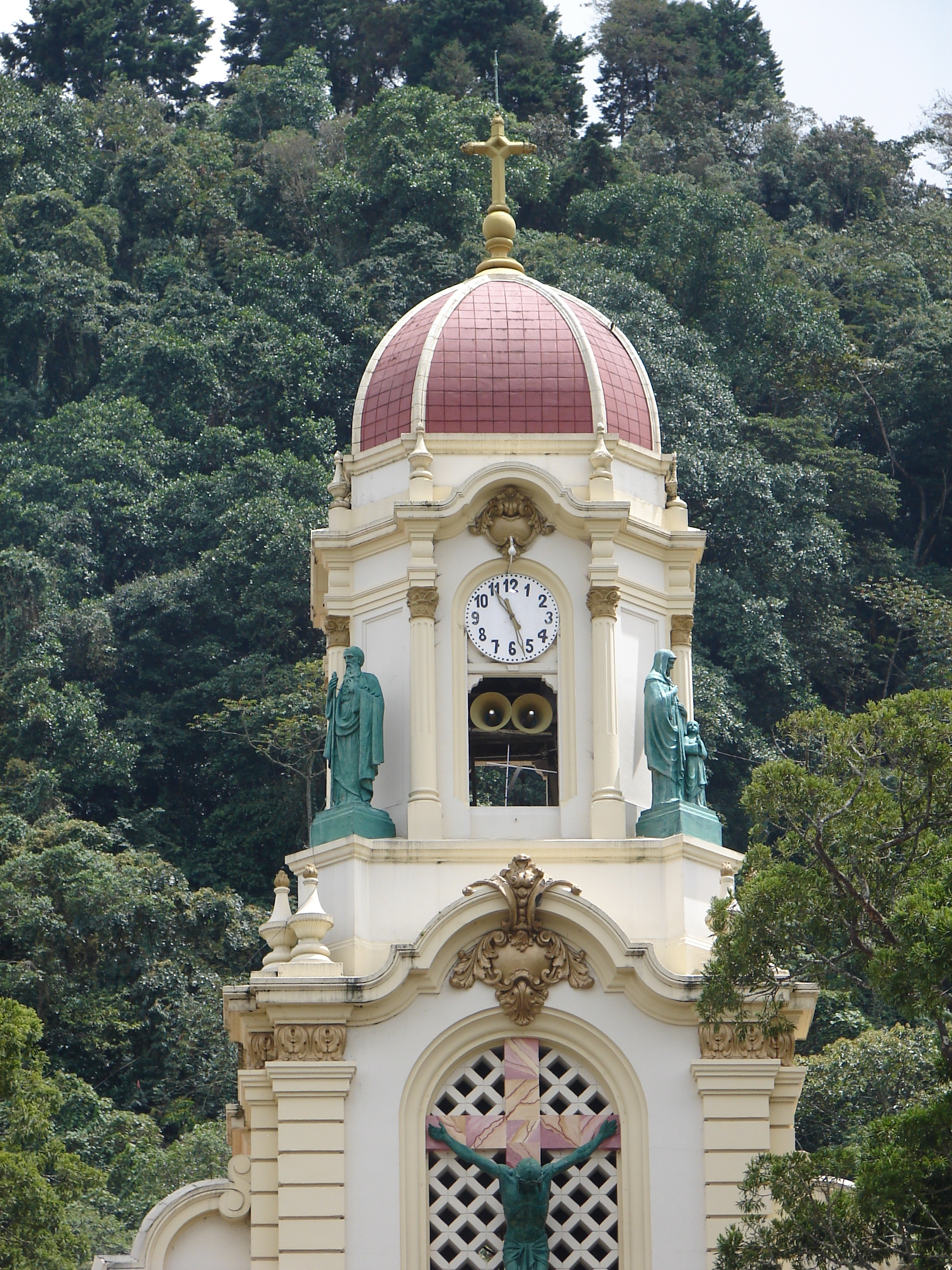 Iglesia de Fredonia, Parque principal